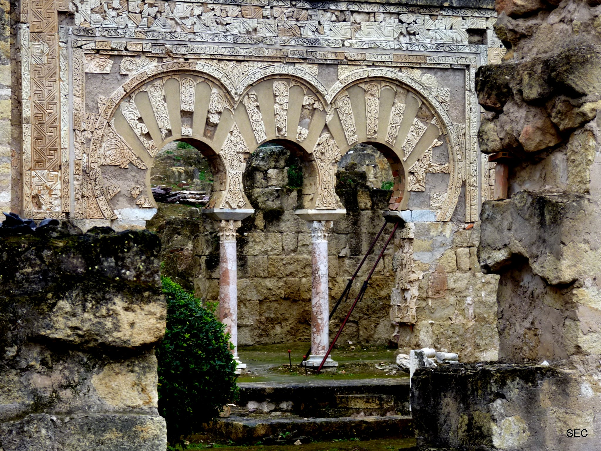 Conjunto Arqueológico Madinat Al-Zahra